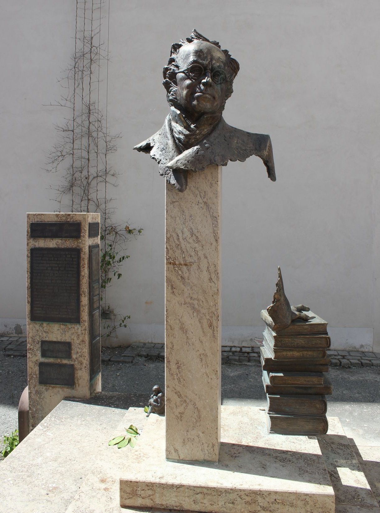 Meyer-Denkmal im Innenhof des ehemaligen Verlagssitzes des Bibliographischen Instituts in Hildburghausen (Obere Marktstraße 44, 98646 Hildburghausen)